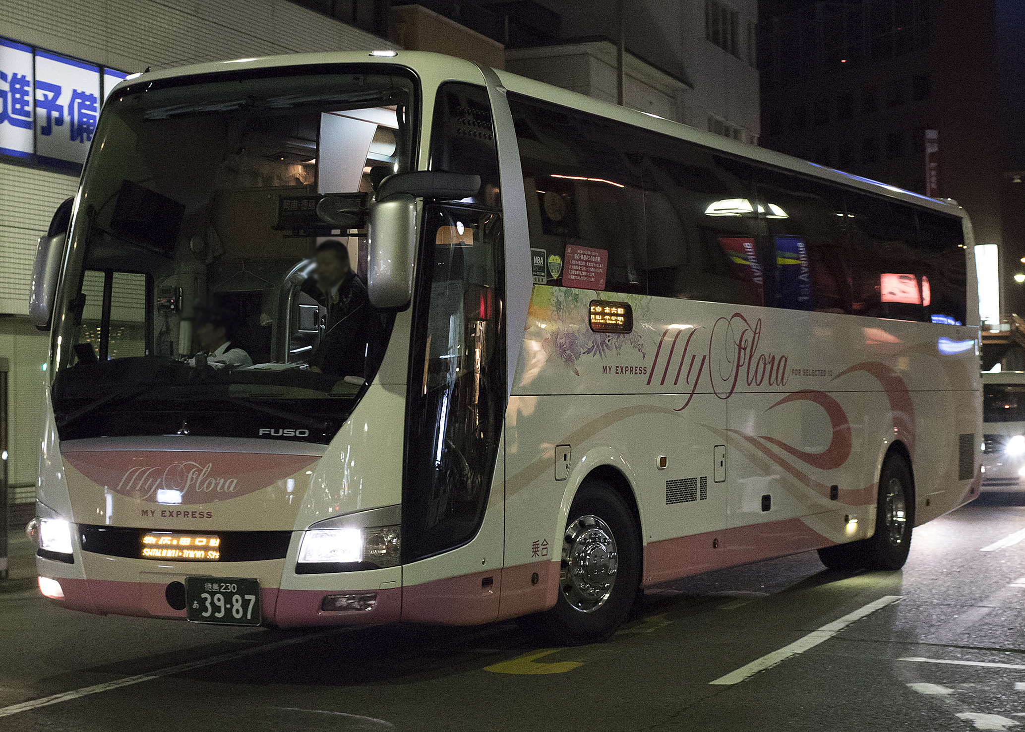 海部観光 MY Flora 徳島－東京線 三菱ふそう・エアロクィーン LKG-MS96VP